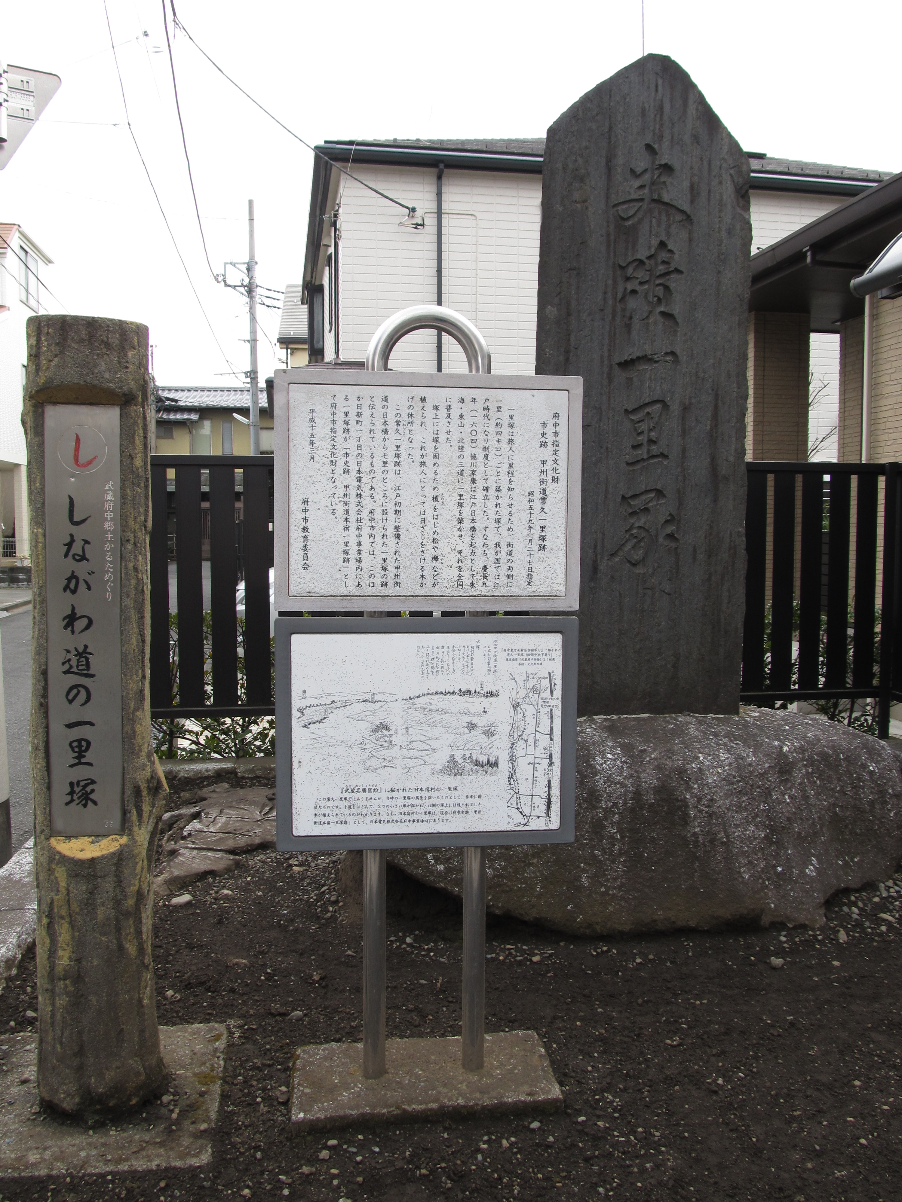 品川道常久一里塚。東京都府中市清水が丘3-15-26